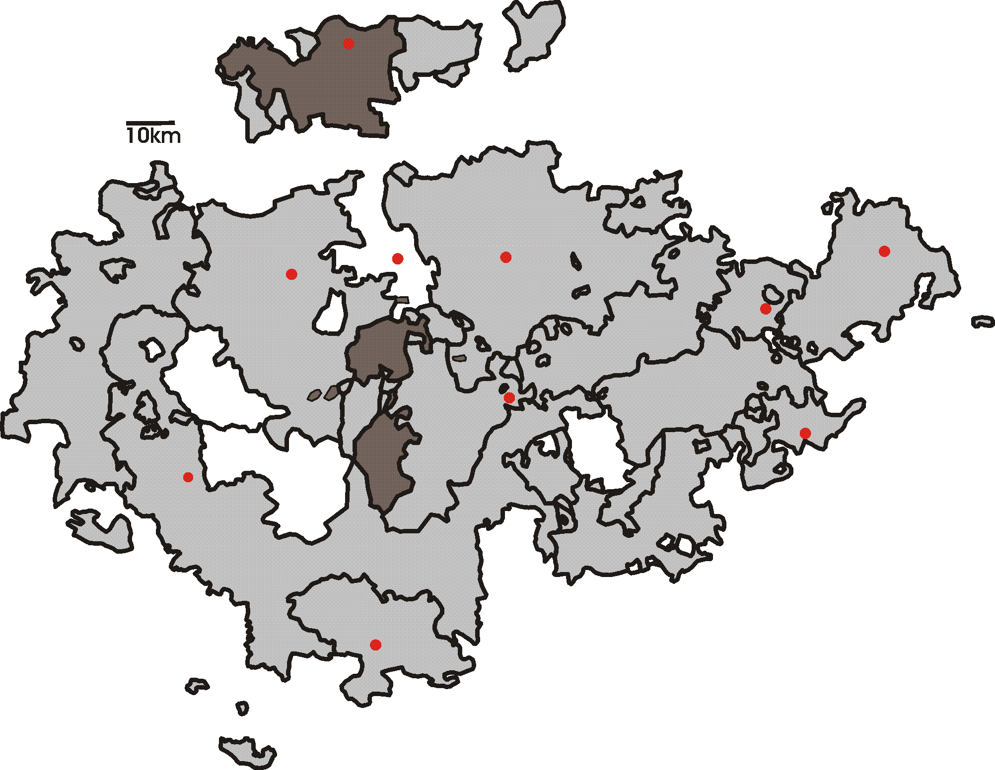 Schwarzburg-Sondershausen in 1900 door nl::de:Benutzer:Störfix PD Bild:SBSO.png